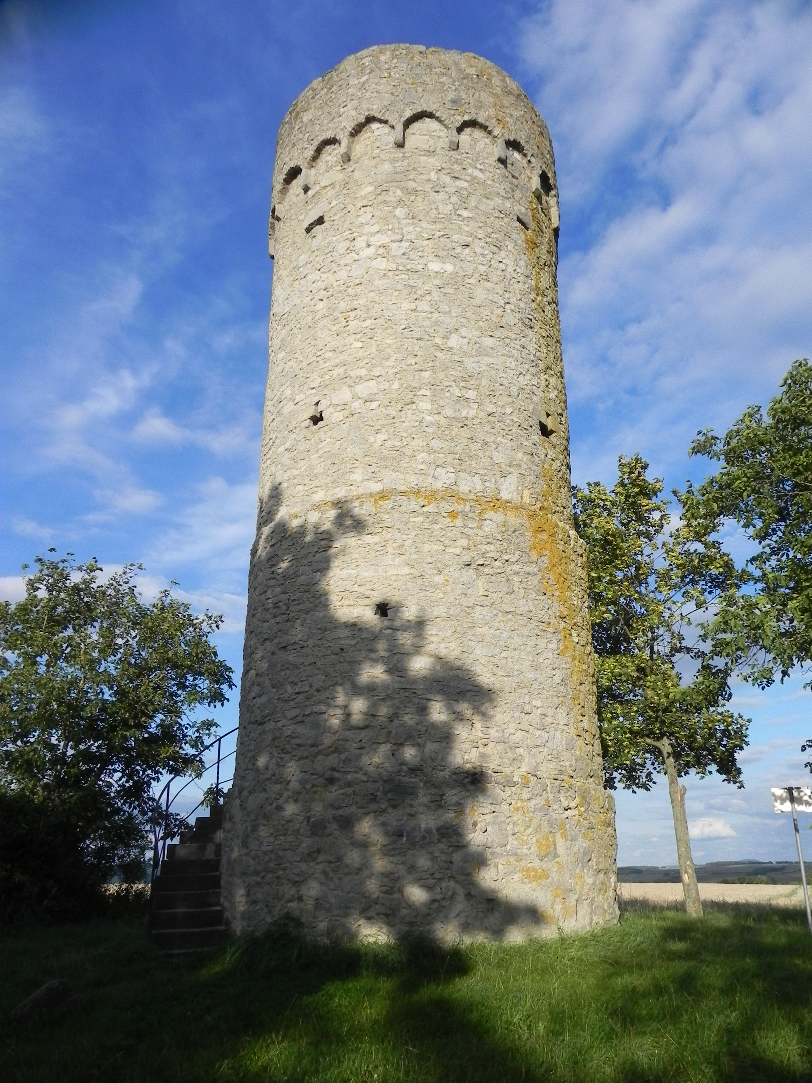 Der Suhlesturm: Ein Wartturm in der bayerischen Rhön zwischen Mellrichstadt und dem Hainhof.